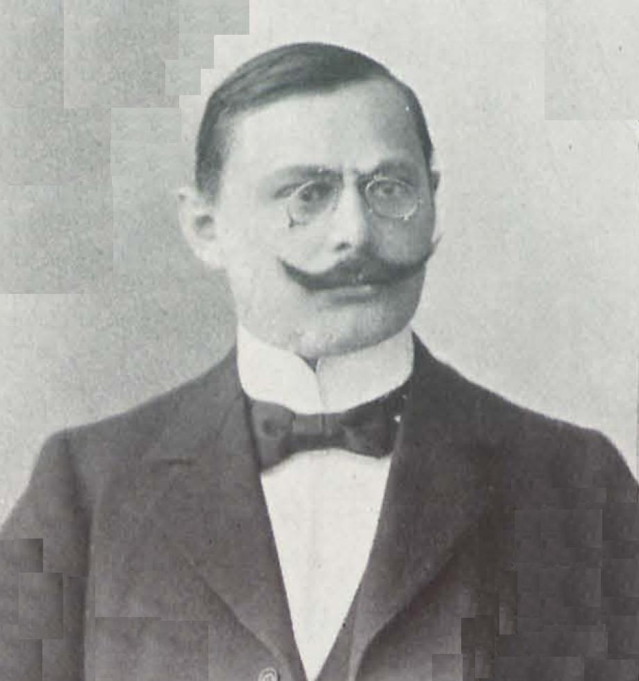 Пауль Мачи